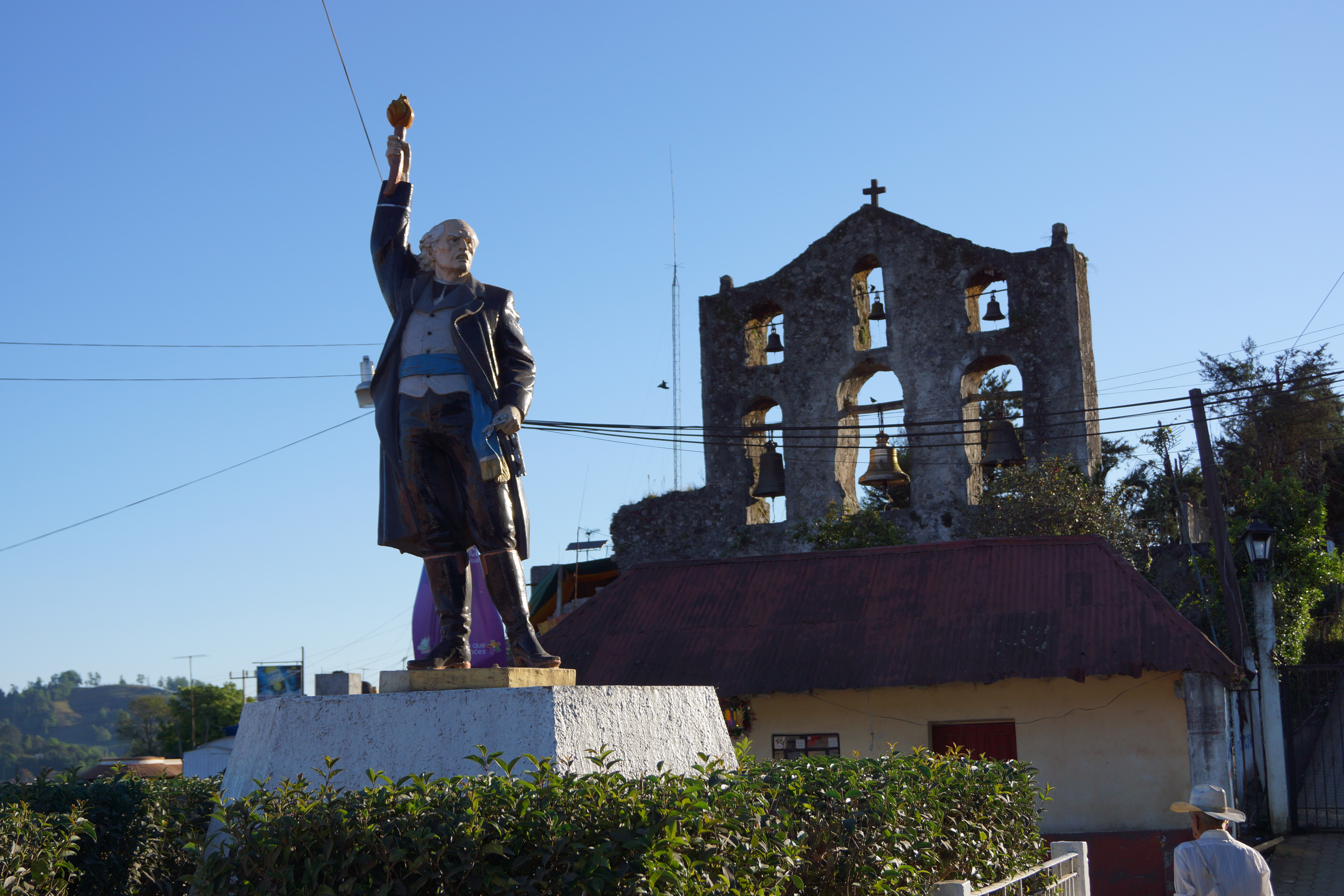 Este Hidalgo es uno de los puntos de referencia más utilizados en Tlanchinol, Hidalgo.